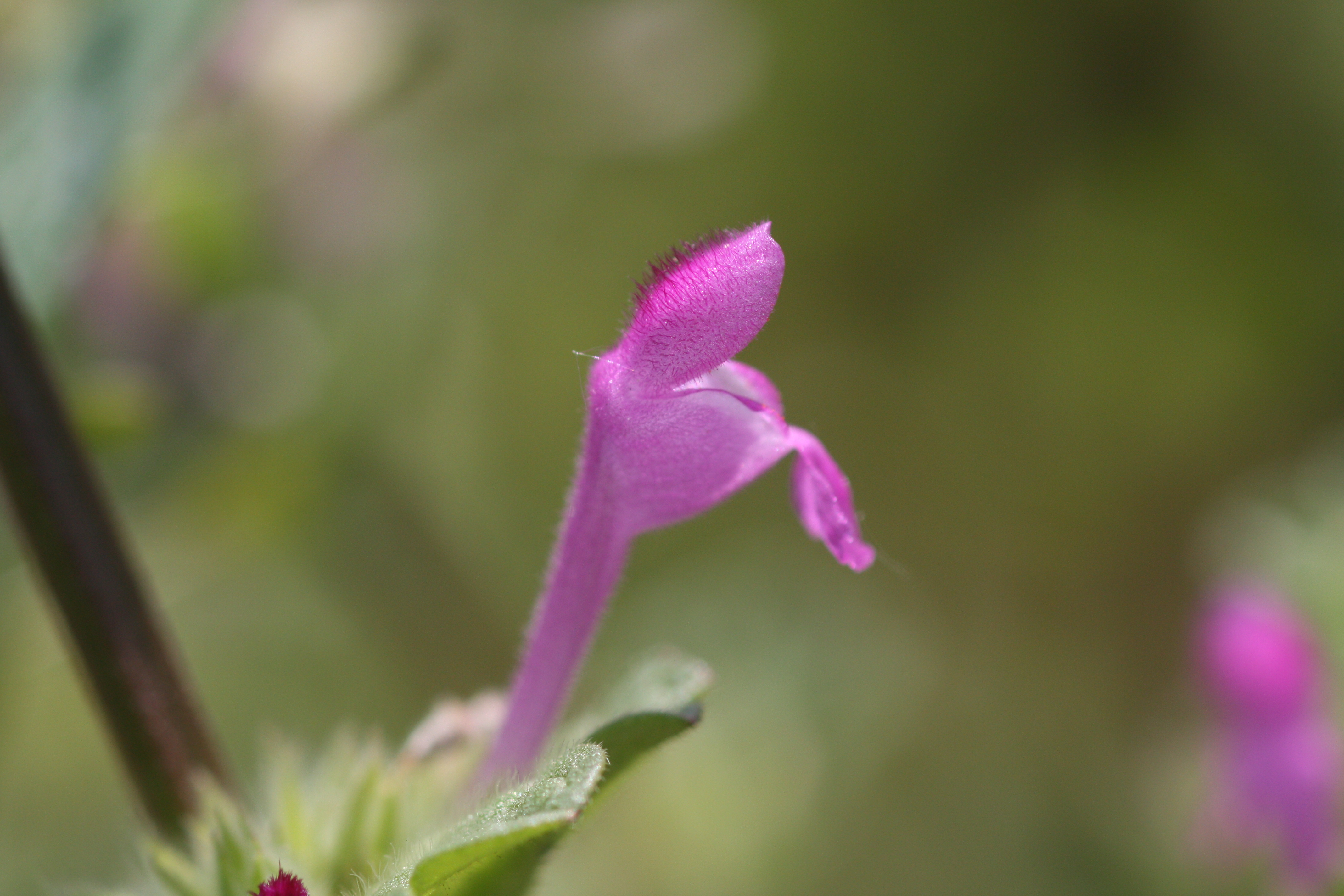 Lamium amplexicaule in Bupyung, Korea